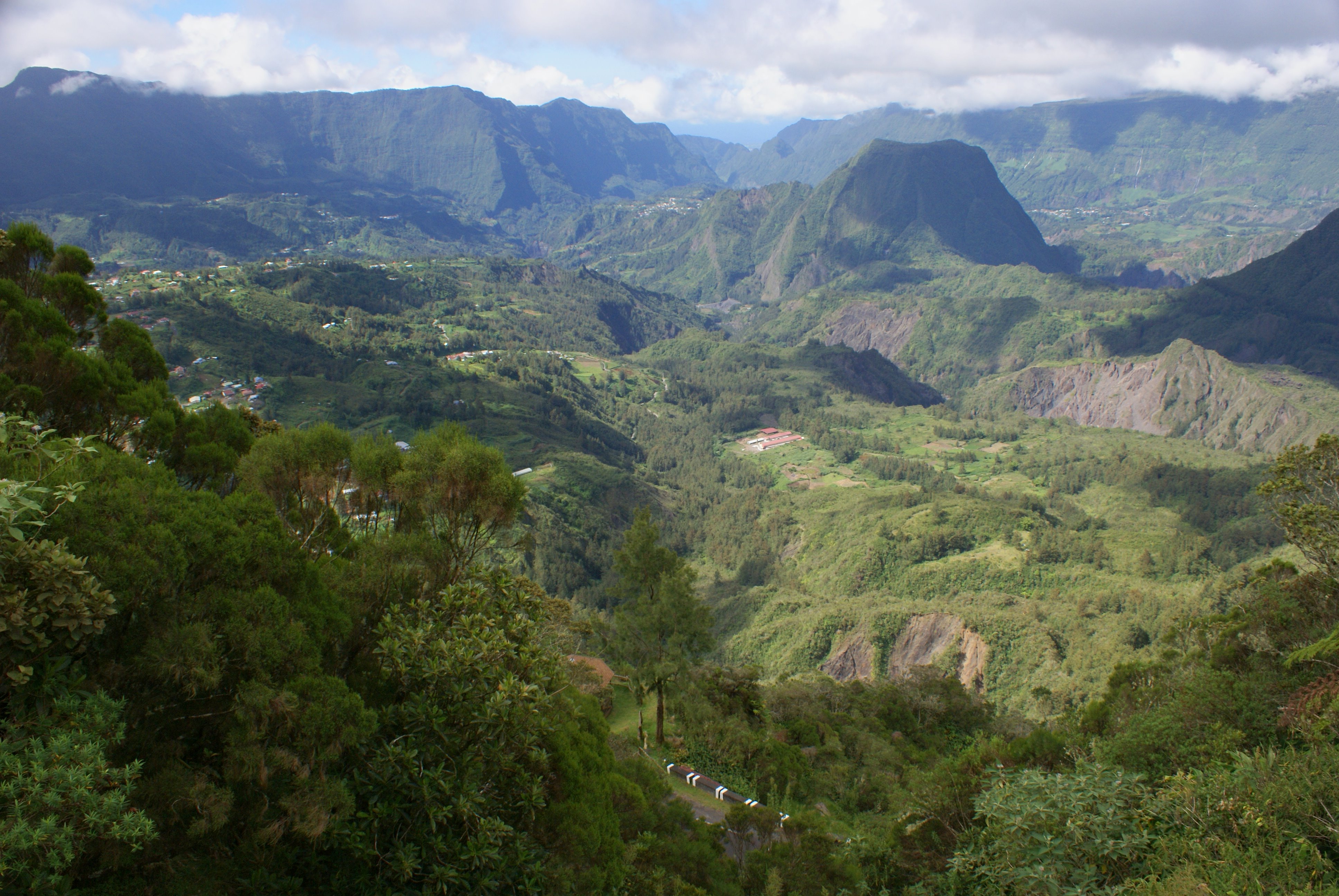 Cirque de Salazie (Réunion island